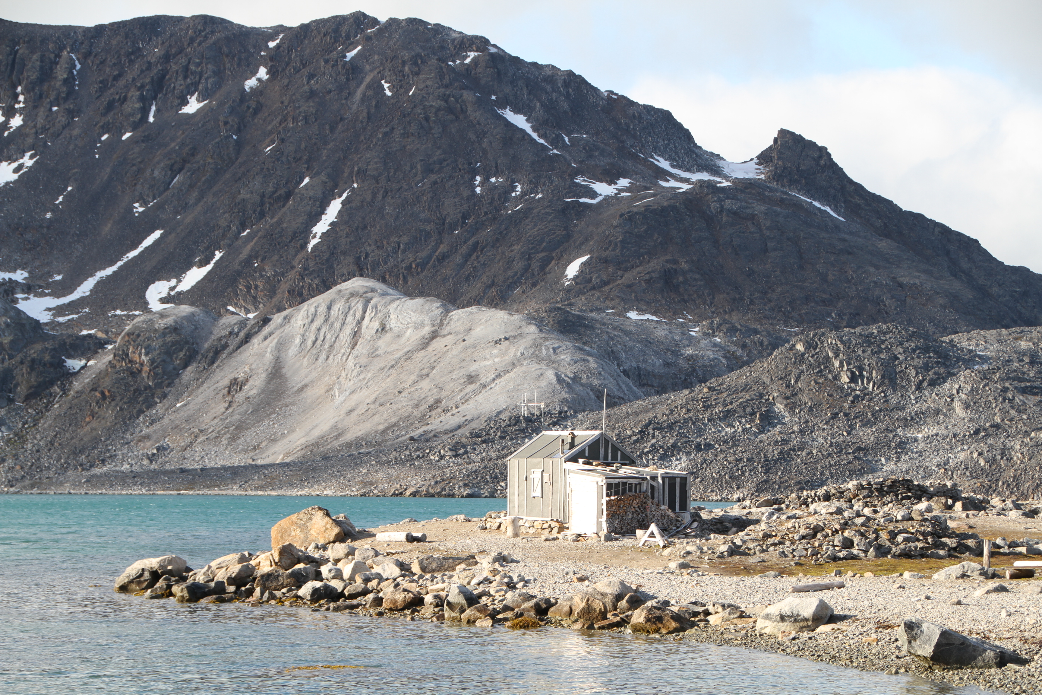 Sallyhamna, northwestern Svalbard